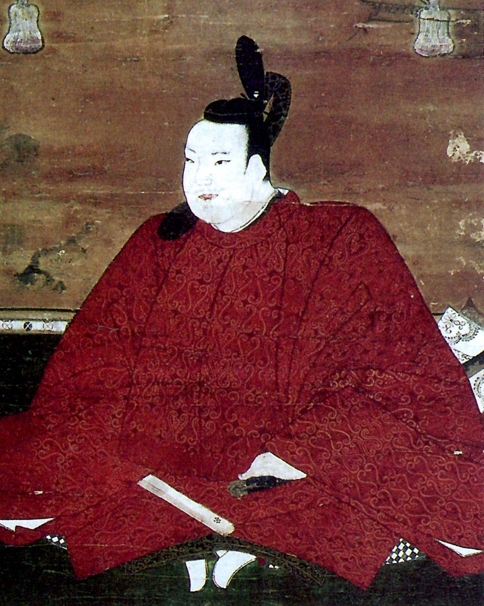 堀直重の肖像。